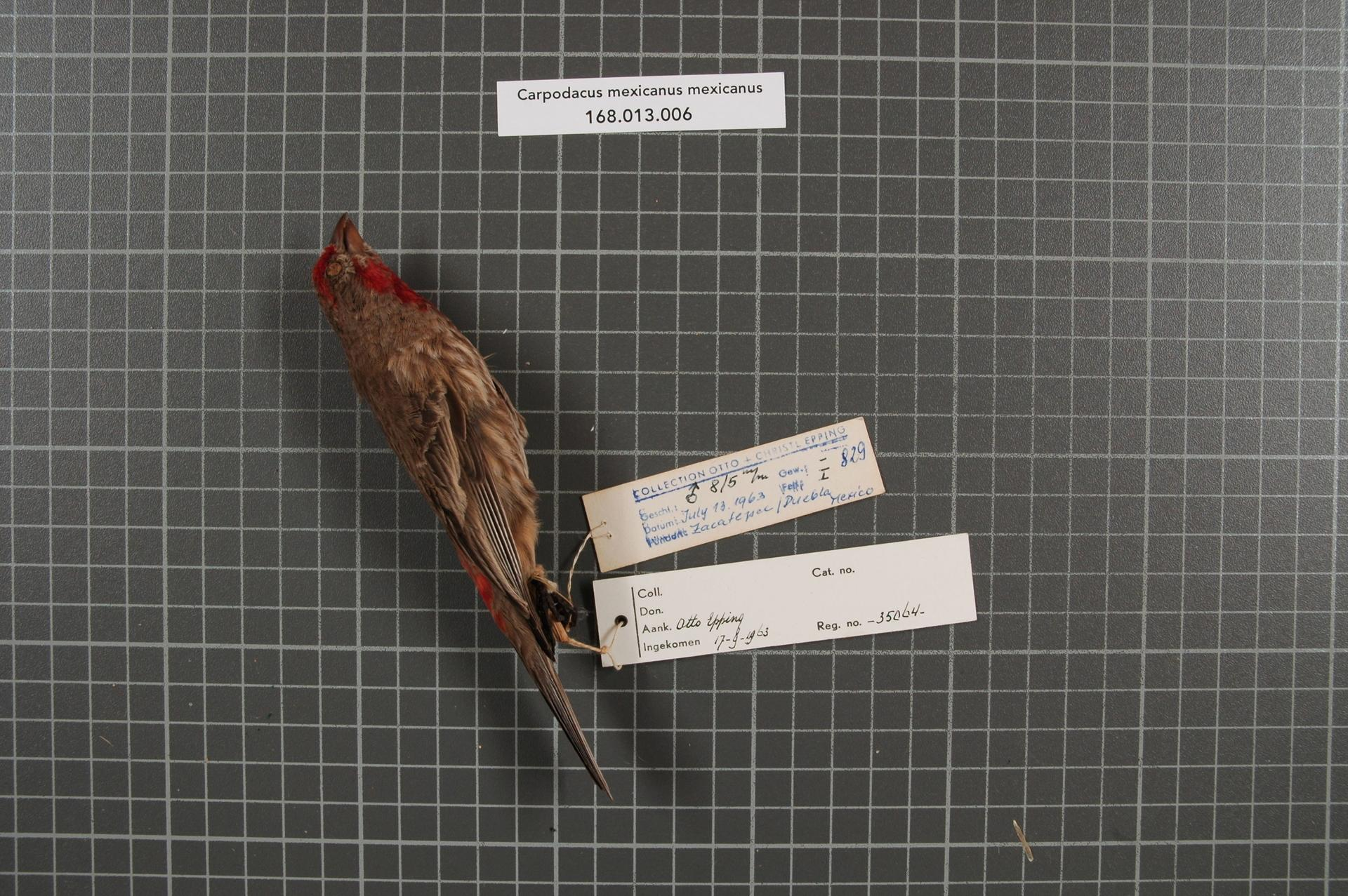 Carpodacus mexicanus mexicanus (P.L.S. Muller, 1776)